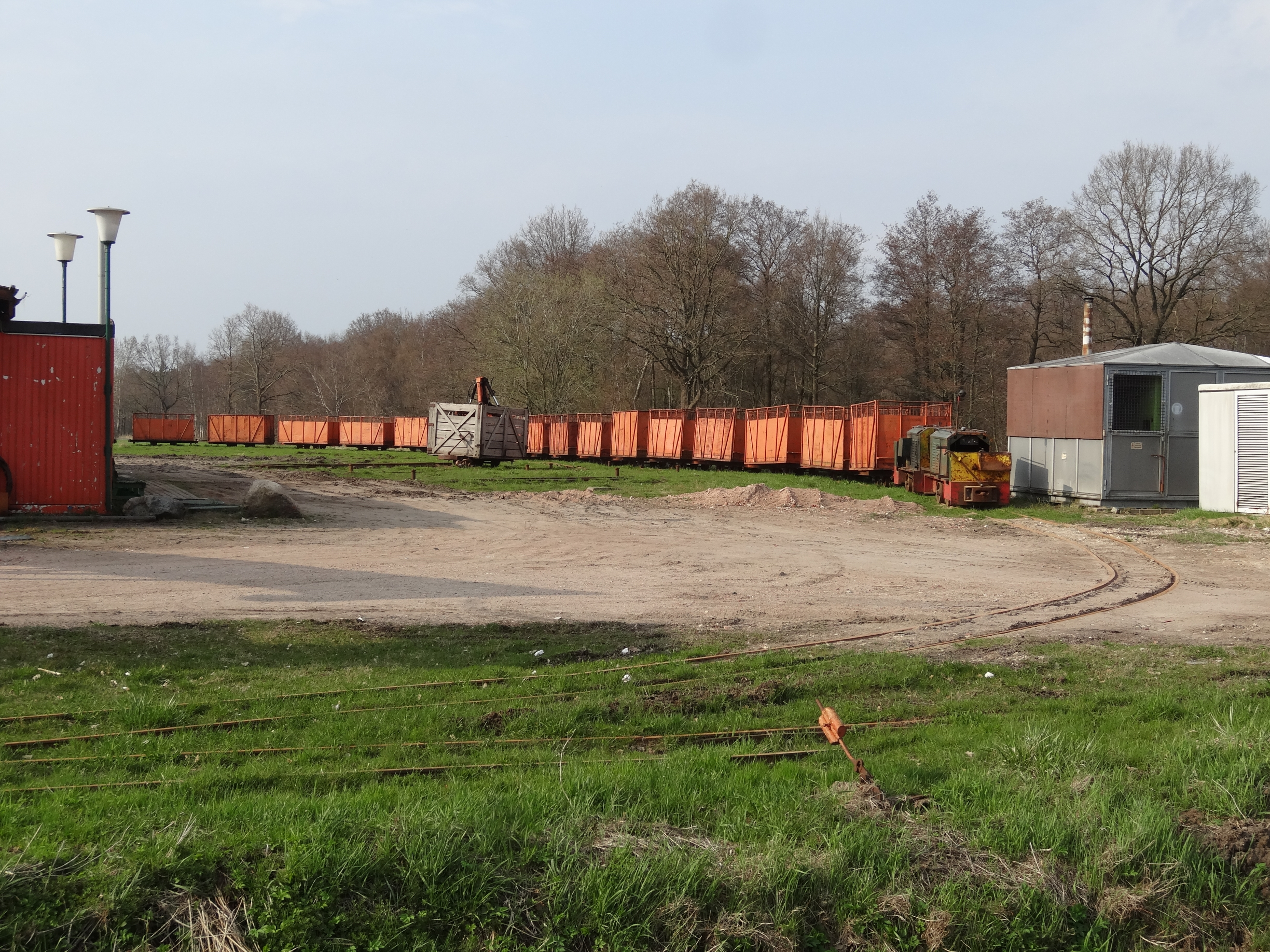 Im Moor in der Nähe von Breitenburg. Die Kleinbahn wird zum Torfabbau genutzt.